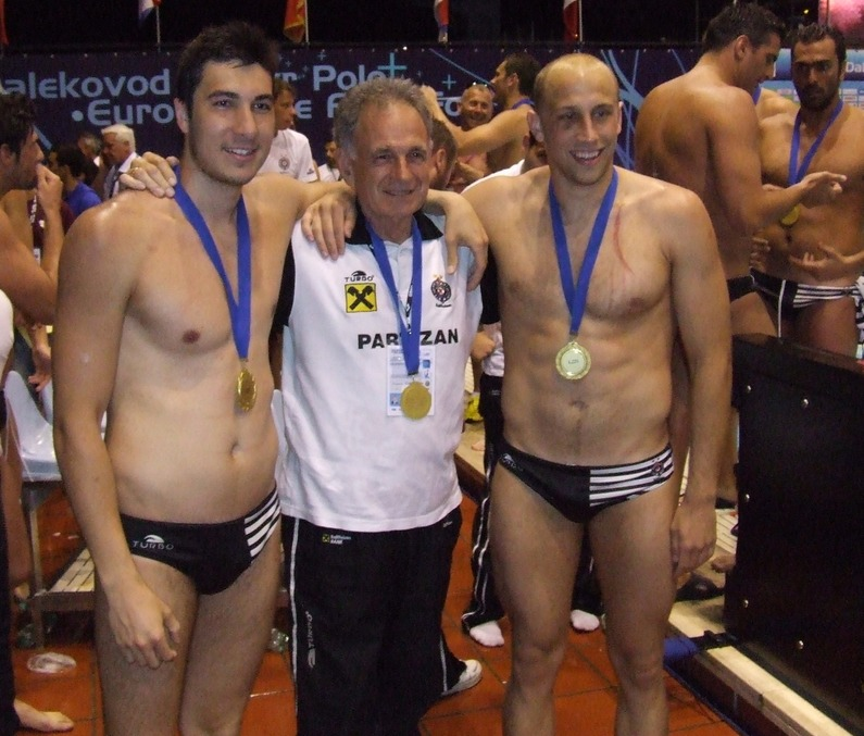 Фајнал-фор Рим 2011: Ватерполисти Партиѕана Стефан Митровић (лево) и Андрија Прлаиновић (десно) са кондиционим тренером Владимиром Павловићем после освојене титуле првака Европе.